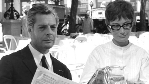 Screenshot del film 8½ (1963)